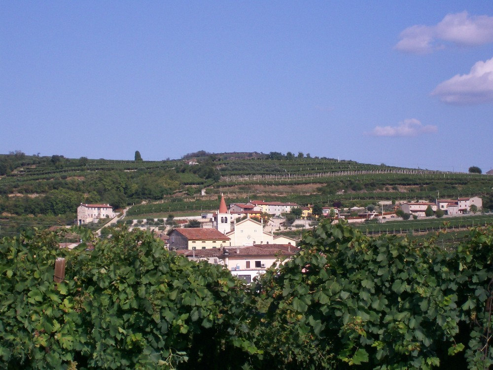 Scorcio di Costeggiola. Al centro la chiesa parrocchiale di S. Antonio Abate. Scattata da me, Zen41, il 24 settembre 2008